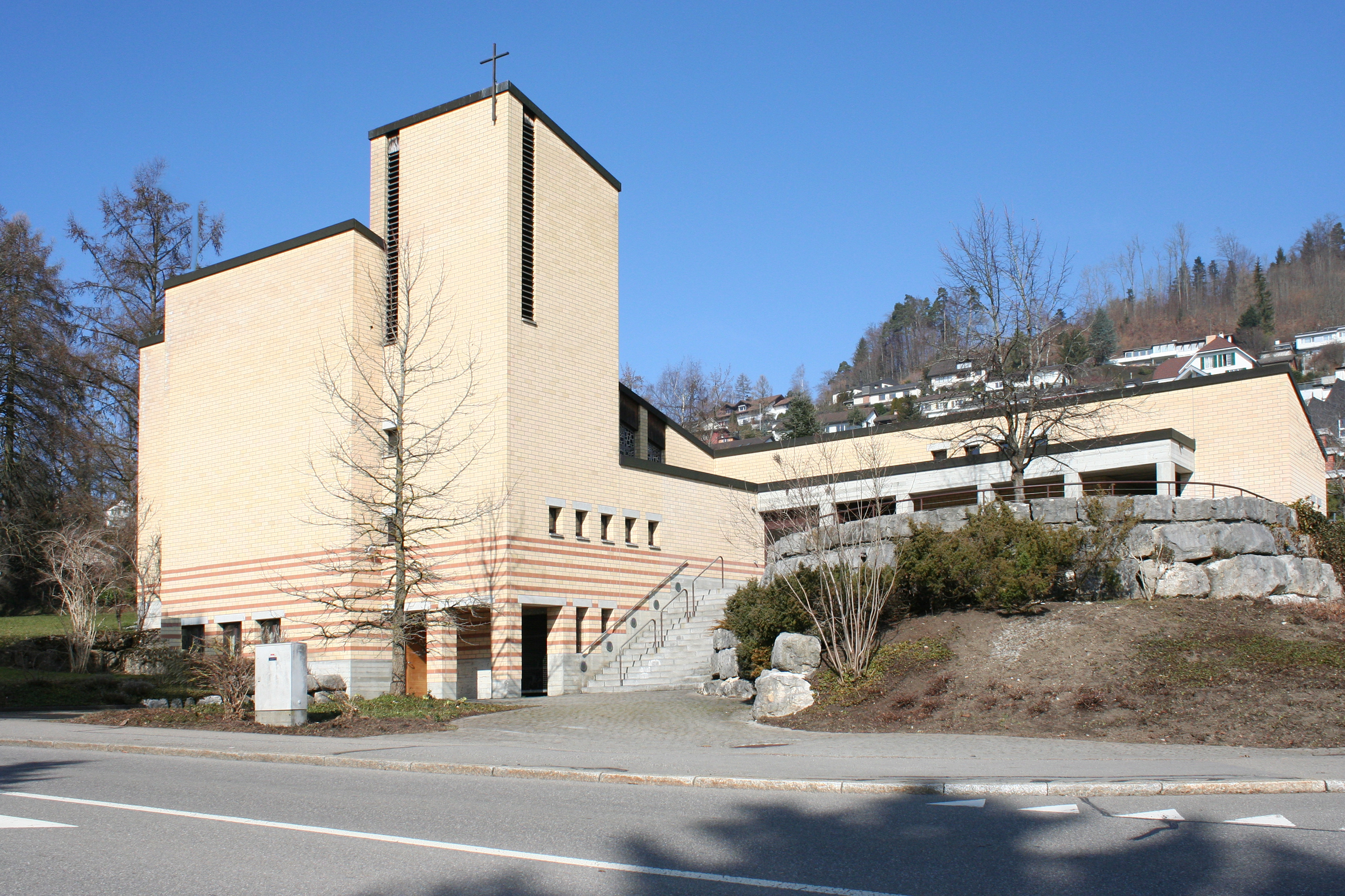 Römisch-katholische Kirche Bruder Klaus Bäretswil